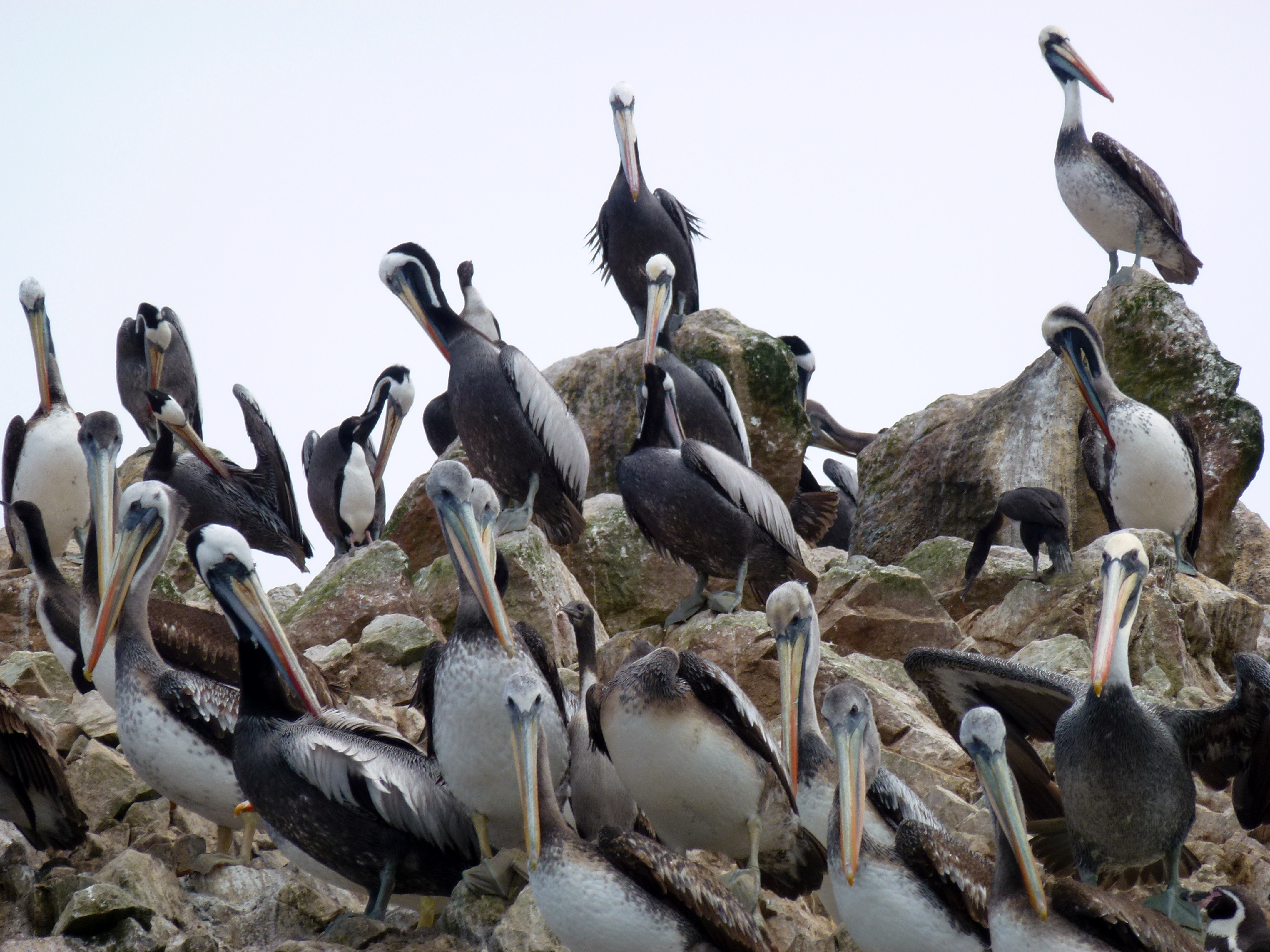 les Îles Ballestas et la Réserve nationale de Paracas Pérou